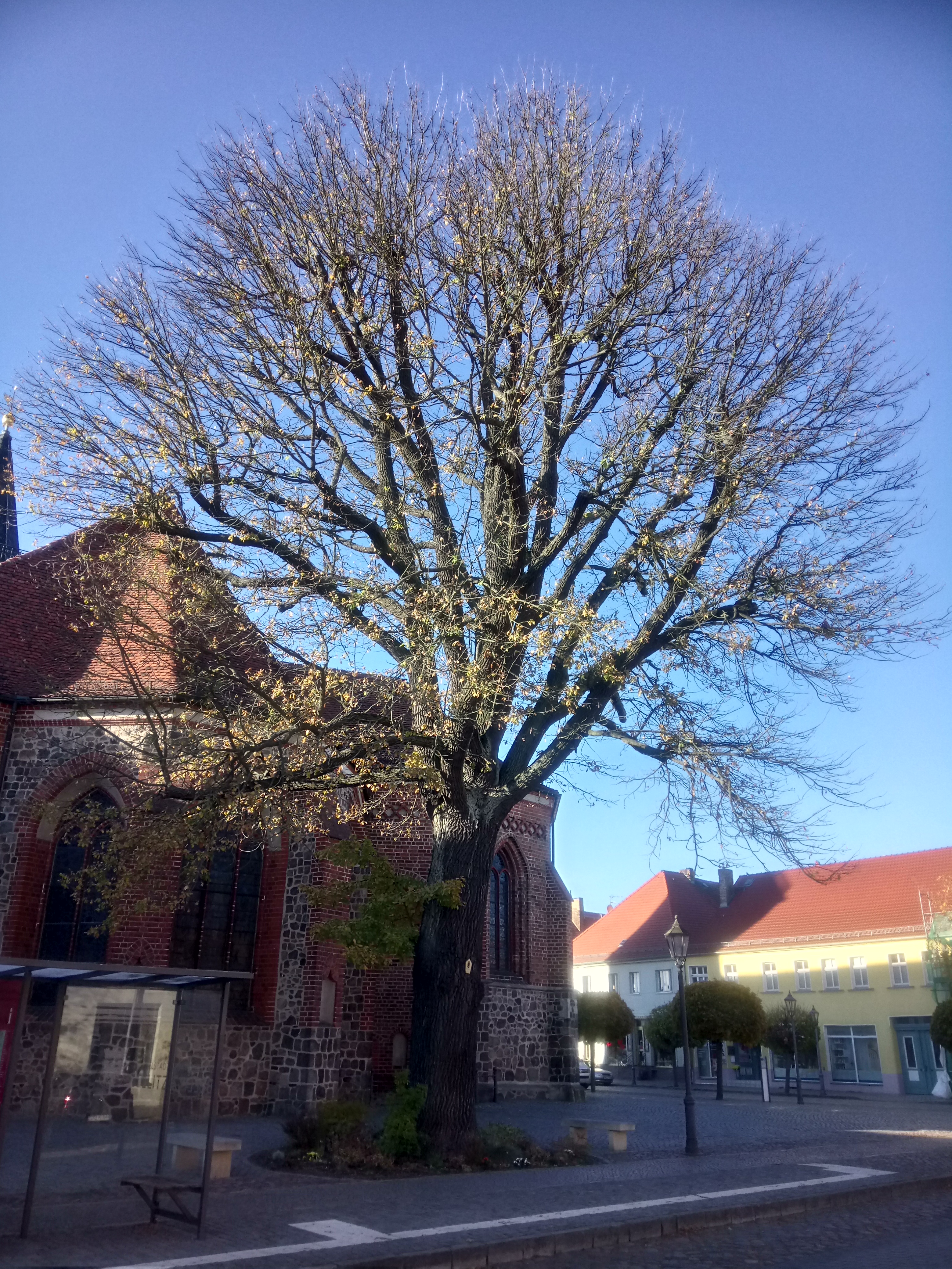 Naturdenkmal ND 016-01 Stiel-Eiche (Quercus robur) mit einem Kronendurchmesser von 20 Meter auf dem Kirchplatz an der Ostseite der Kirche in Beelitz, Land Brandenburg, Deutschland.